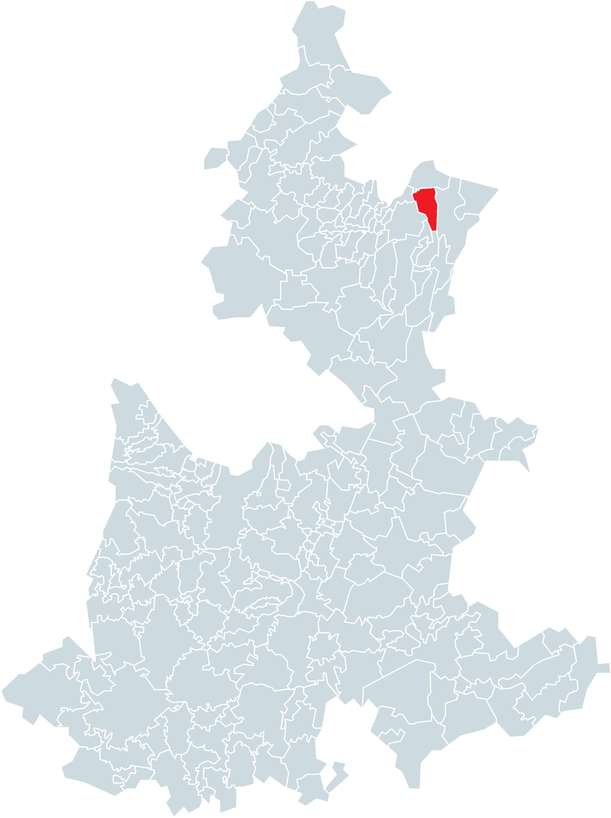 Municipio de Ayotoxco de Guerrero